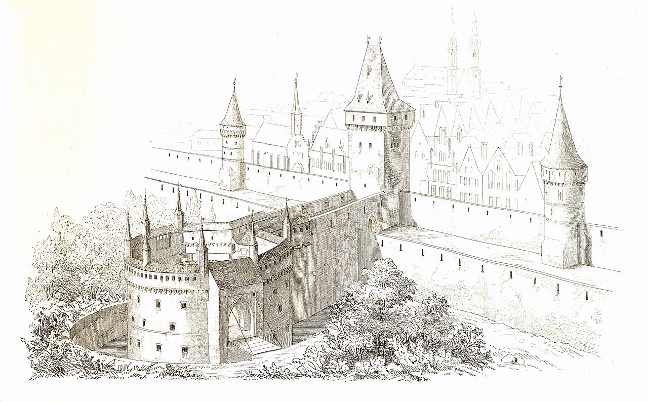 зроблено в польщі